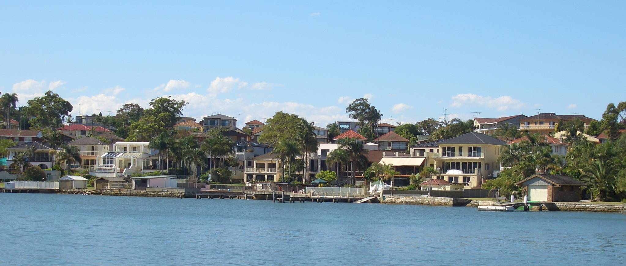 Blakehurst